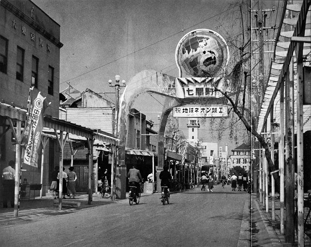 静岡市七間町にあった「地球ネオン」。